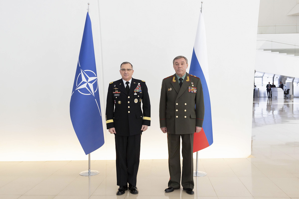 Встреча начальника Генерального штаба Вооруженных Сил Российской Федерации – первого заместителя Министра обороны генерала армии Валерия Герасимова с Верховным главнокомандующим объединенными вооруженными силами НАТО генералом Кертисом Скапарротти